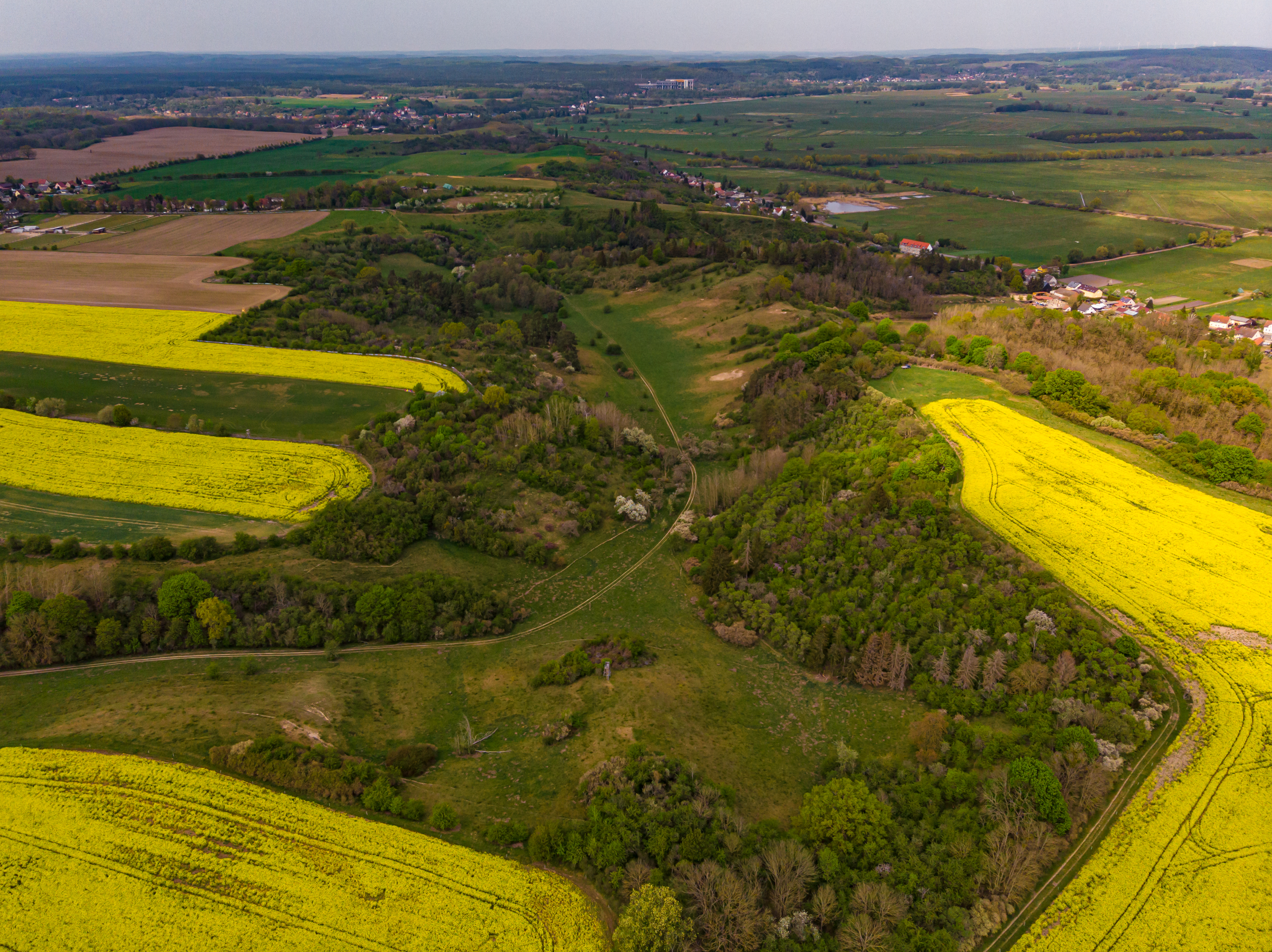 Falkenberg